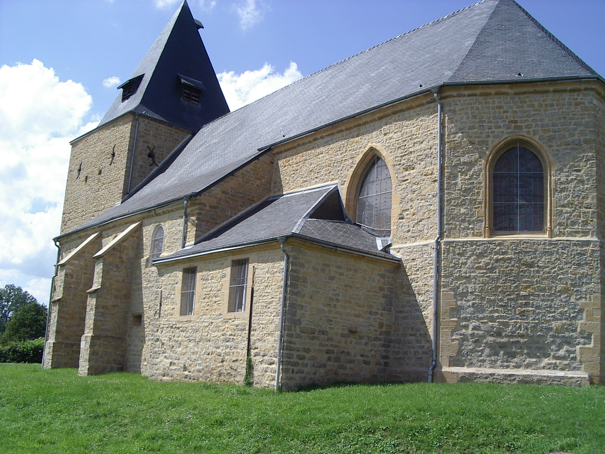 Église Saint-Martin de Cliron, departement des Ardennes, France. .